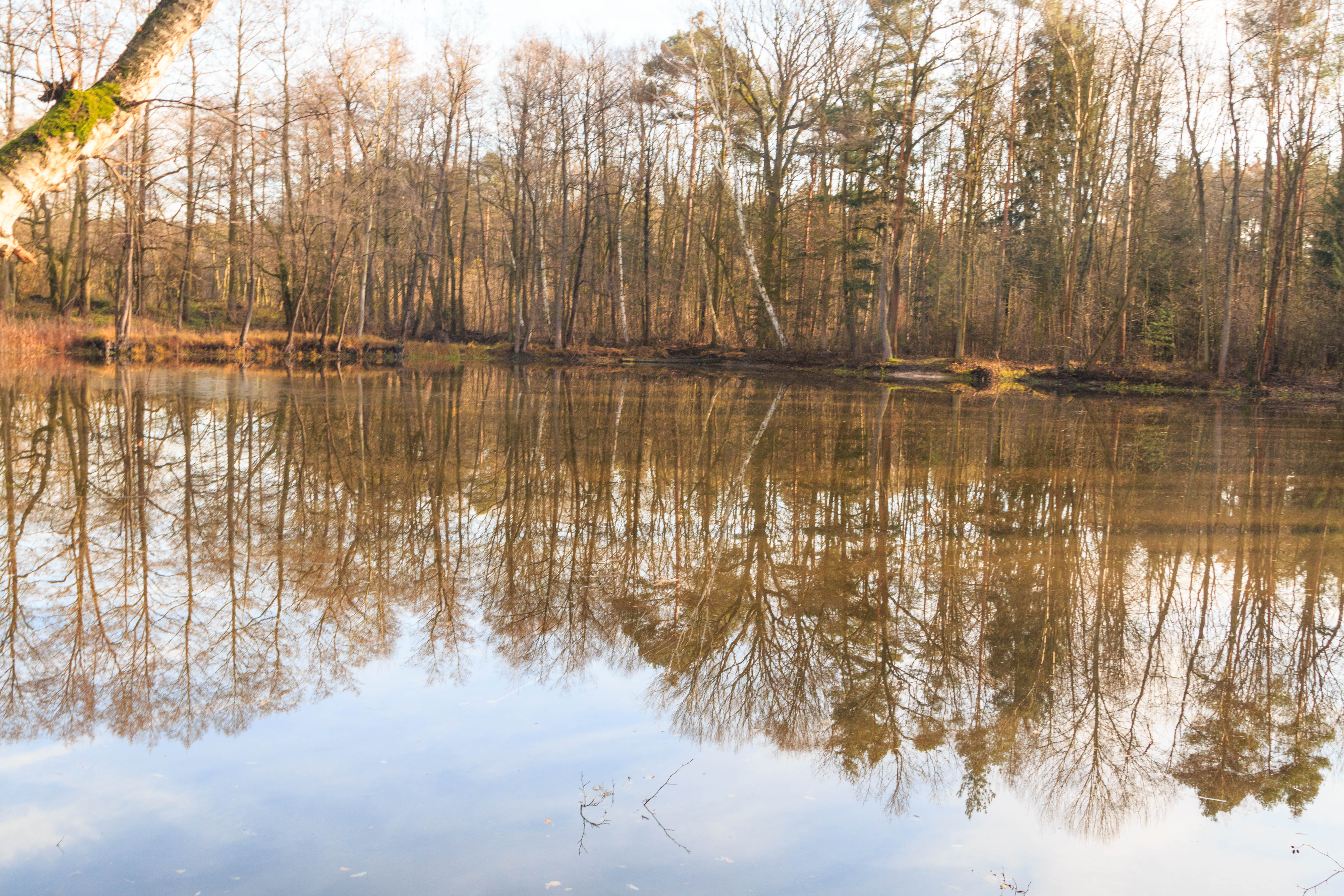 Lesní rybník u hájenky ve Strašově Project: Vodstvo.